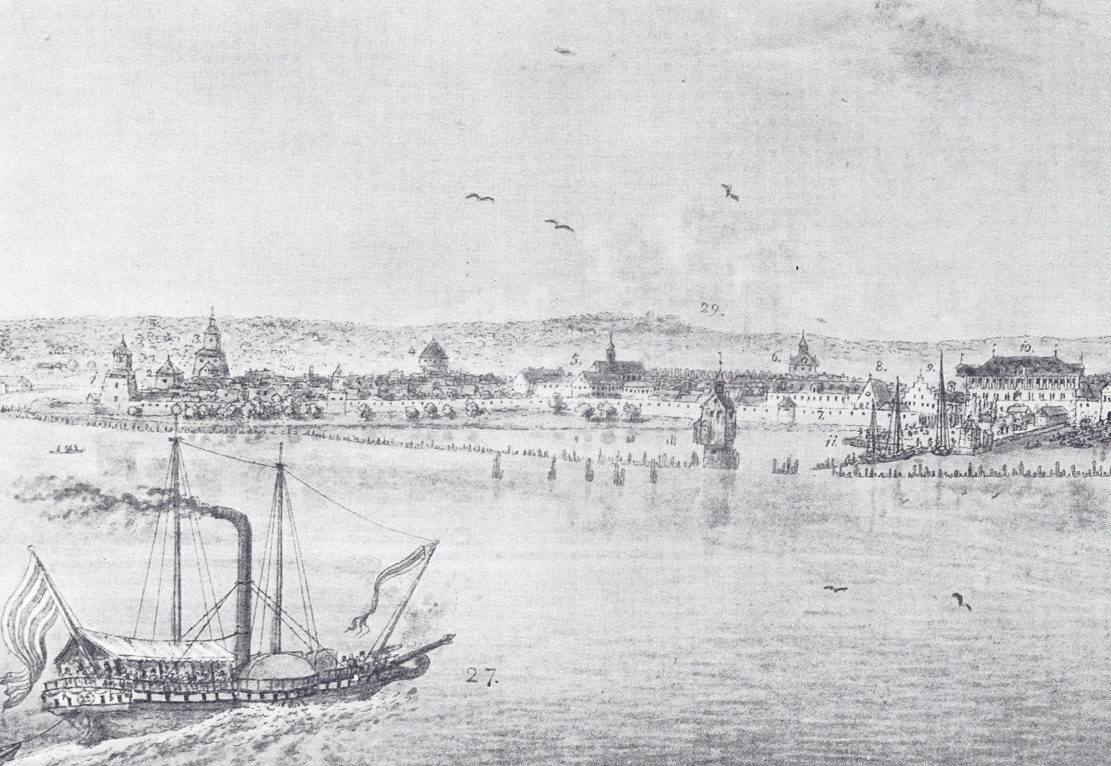 Der alte Konstanzer Hafen mit den Palisaden, dem Lukenhäuschen des Hafenmeisters und dem Damm vor dem Konzil, 1827. Im Vordergrund das Dampfschiff Max Joseph